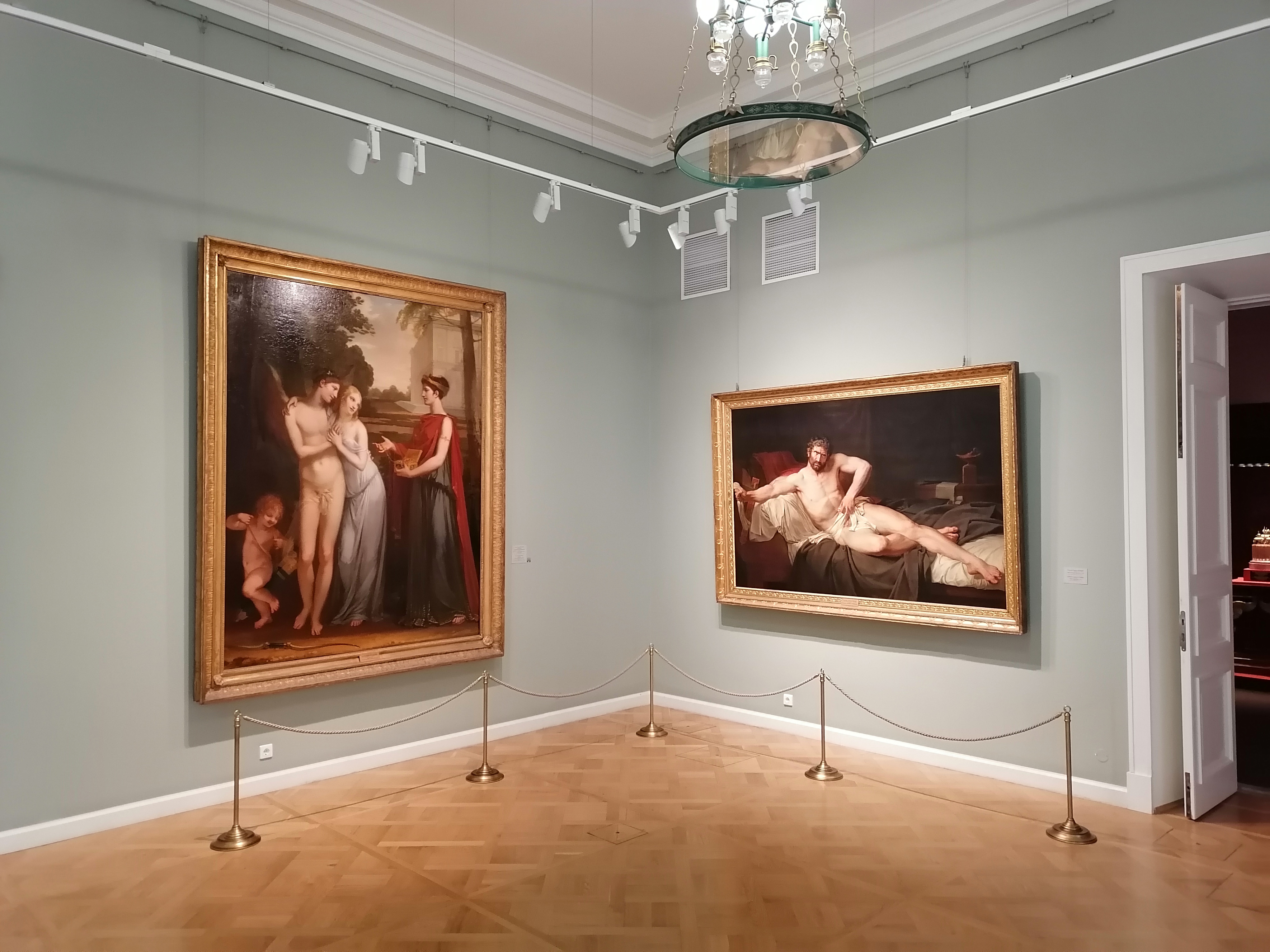 Эрмитаж, здание Главного штаба, зал 303 - Пьер Поль Прюдон и Констанция Майер-Ламартиньер "Невинность, предпочитающая любовь богатству" и Гильом Гильон Летьер "Смерть Катона Утического"